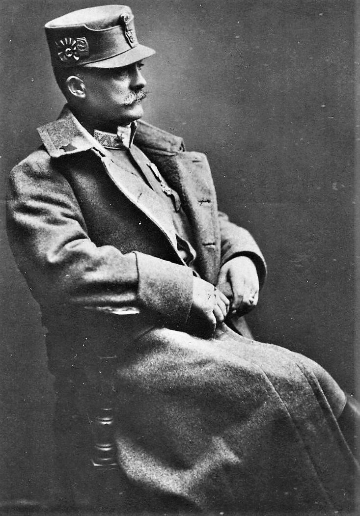 Мирон Емельянович Тарнавский (1869—1938) — галицийский австрийский и украинский военный деятель, генерал-лейтенант (генерал-четарь), командир Галицкой армии (1919).